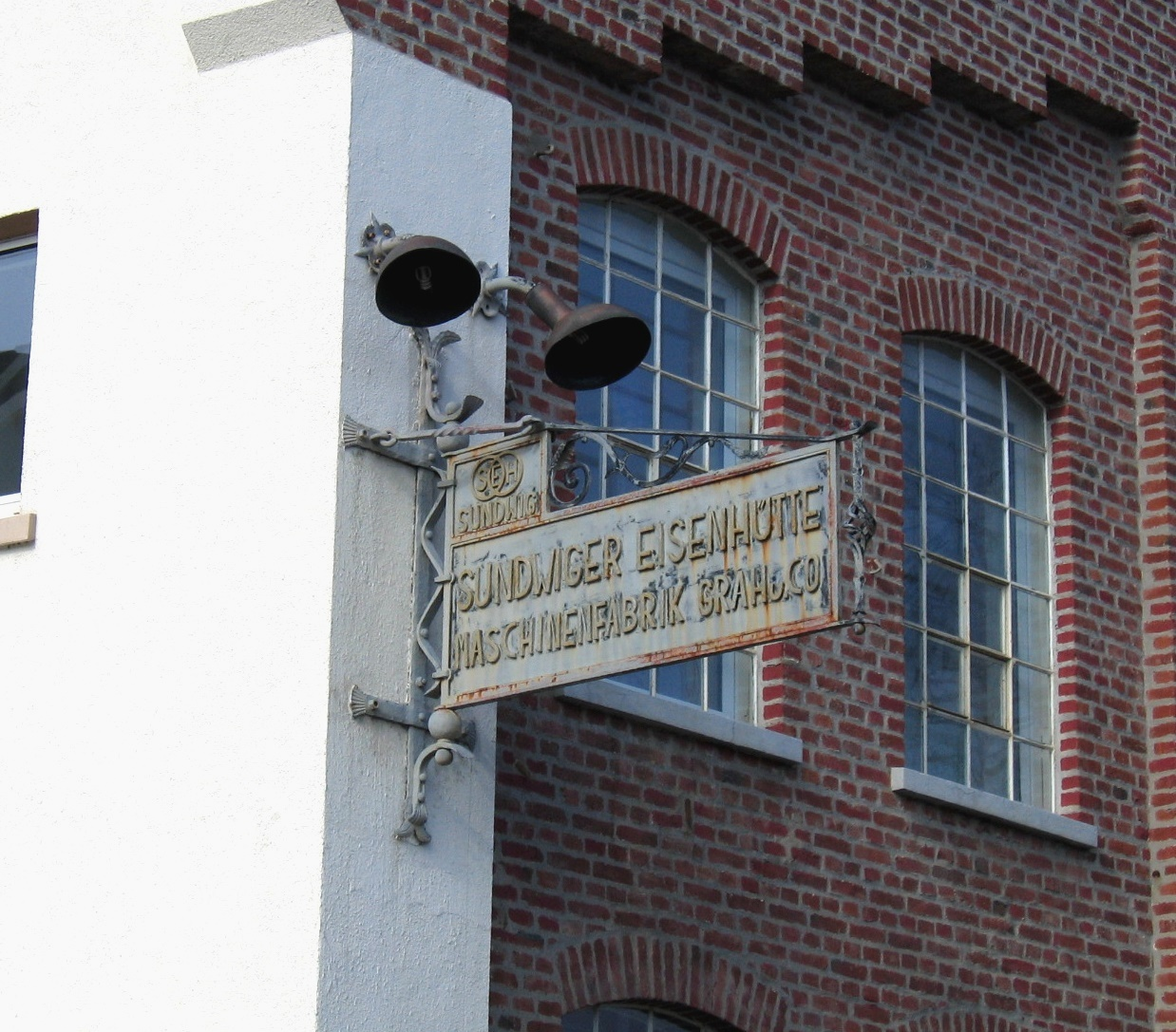 Description: Detail am Fabrikgebäude der Sundwig GmbH in Hemer Source: selbst fotografiert Date: 18. März 2006 Author: Bubo